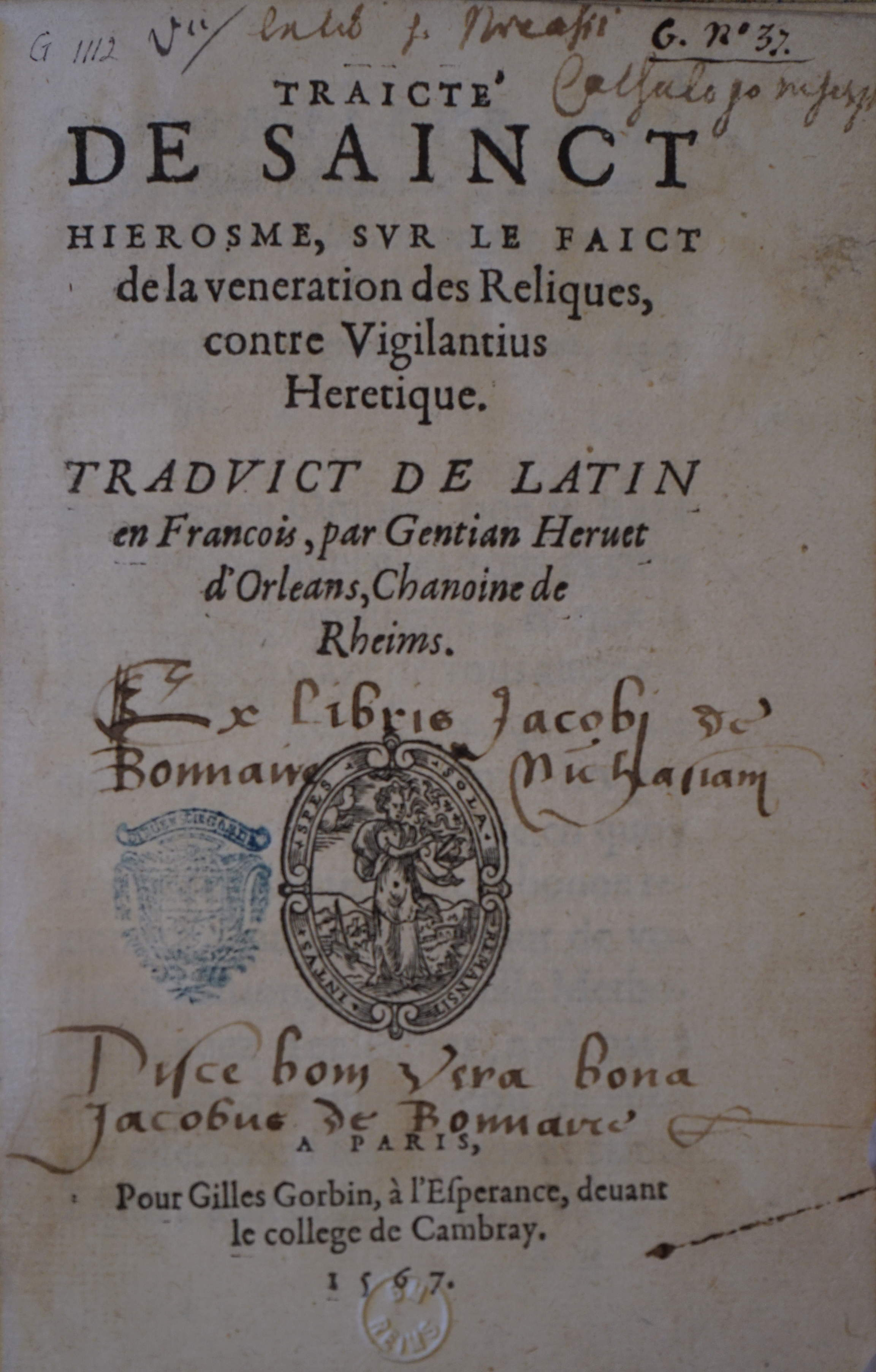 ex-libris écrit à la main par Jacques de Bonnaire, extrait d'un livre de la bibliothèque de st-Nicaise.